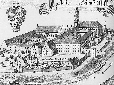 Stich des Klosters Geisenfeld